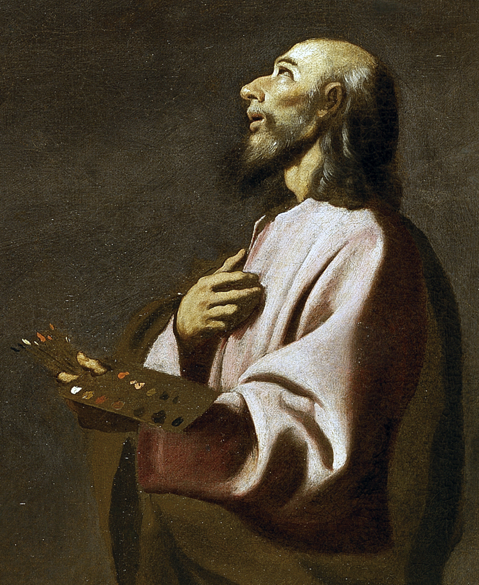 detail: Possibly Self-portrait [1][2][3]